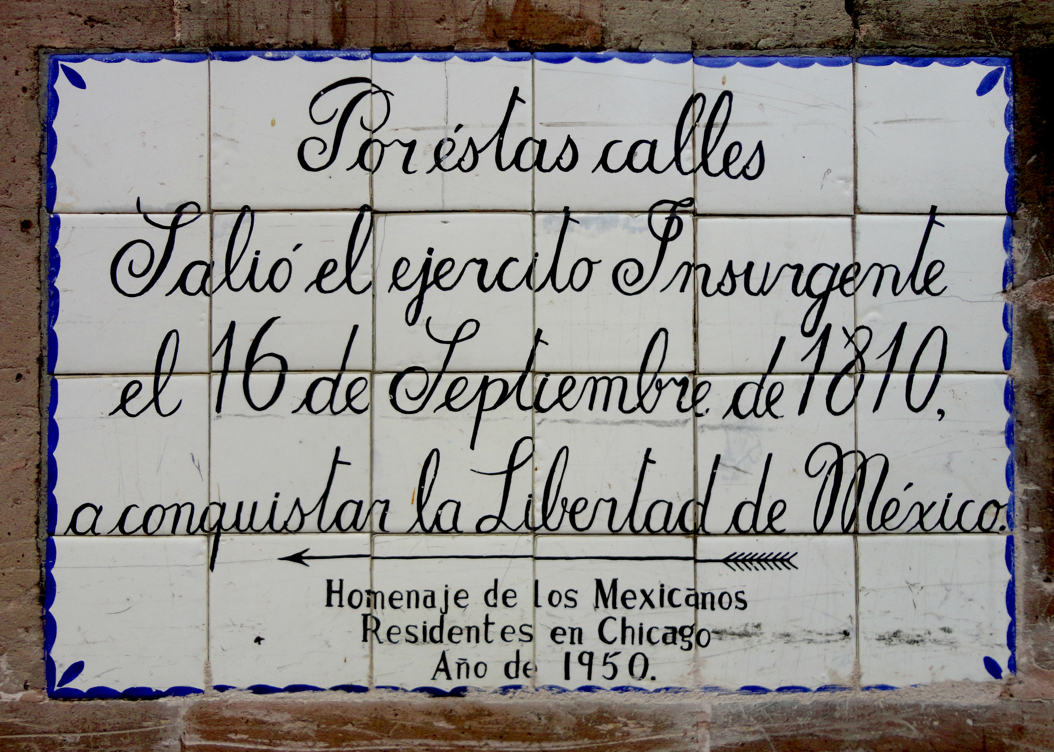 Placa conmemorativa de la Independencia de México en calle Jalisco, zona centro, Dolores Hidalgo, Guanajuato, México. "POR ESTAS CALLES SALIÓ EL EJÉRCITO INSURGENTE EL 16 DE SEPTIEMBRE DE 1810 A CONQUISTAR LA LIBERTAD DE MÉXICO".